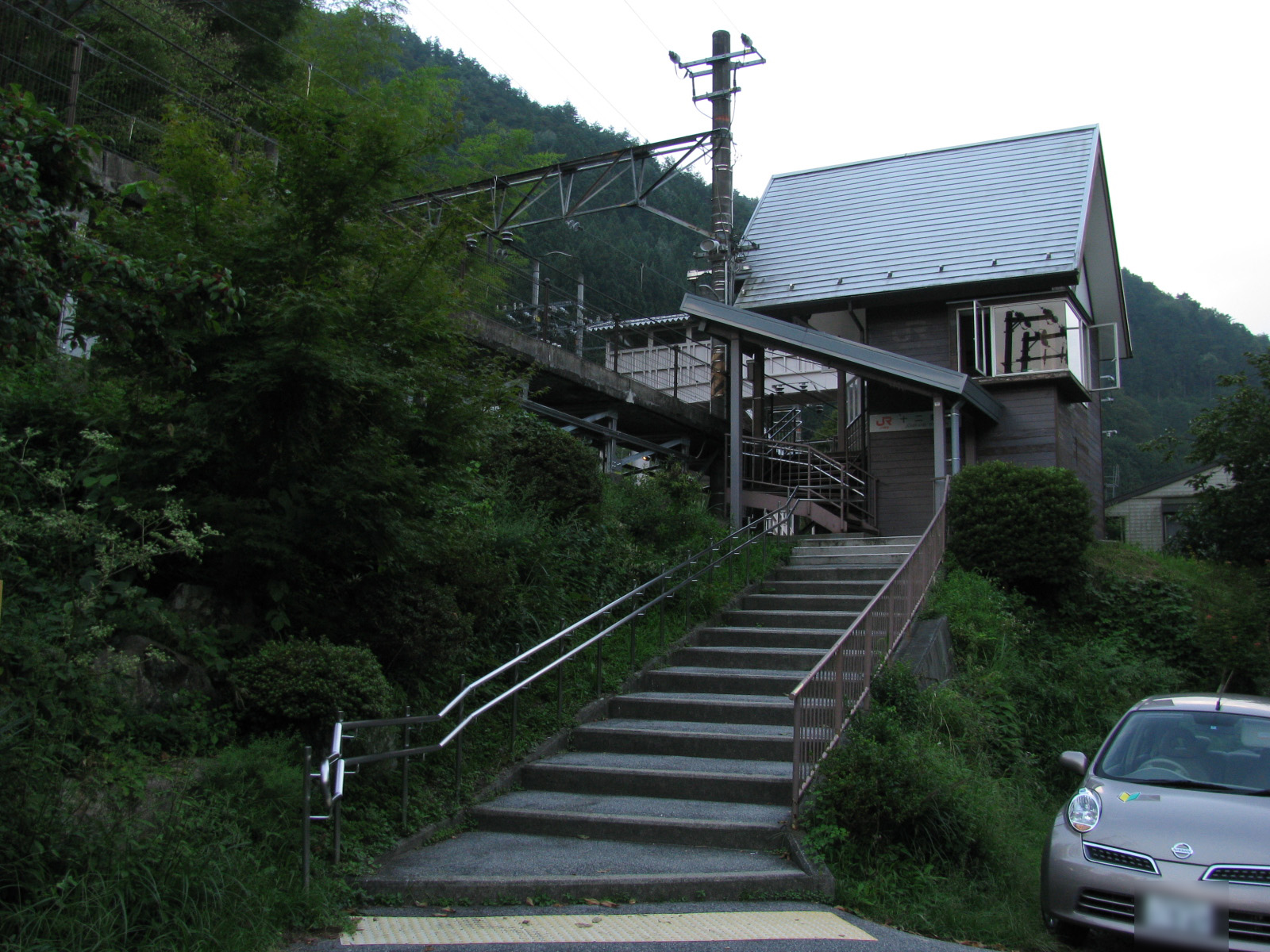 JR中央本線十二兼駅